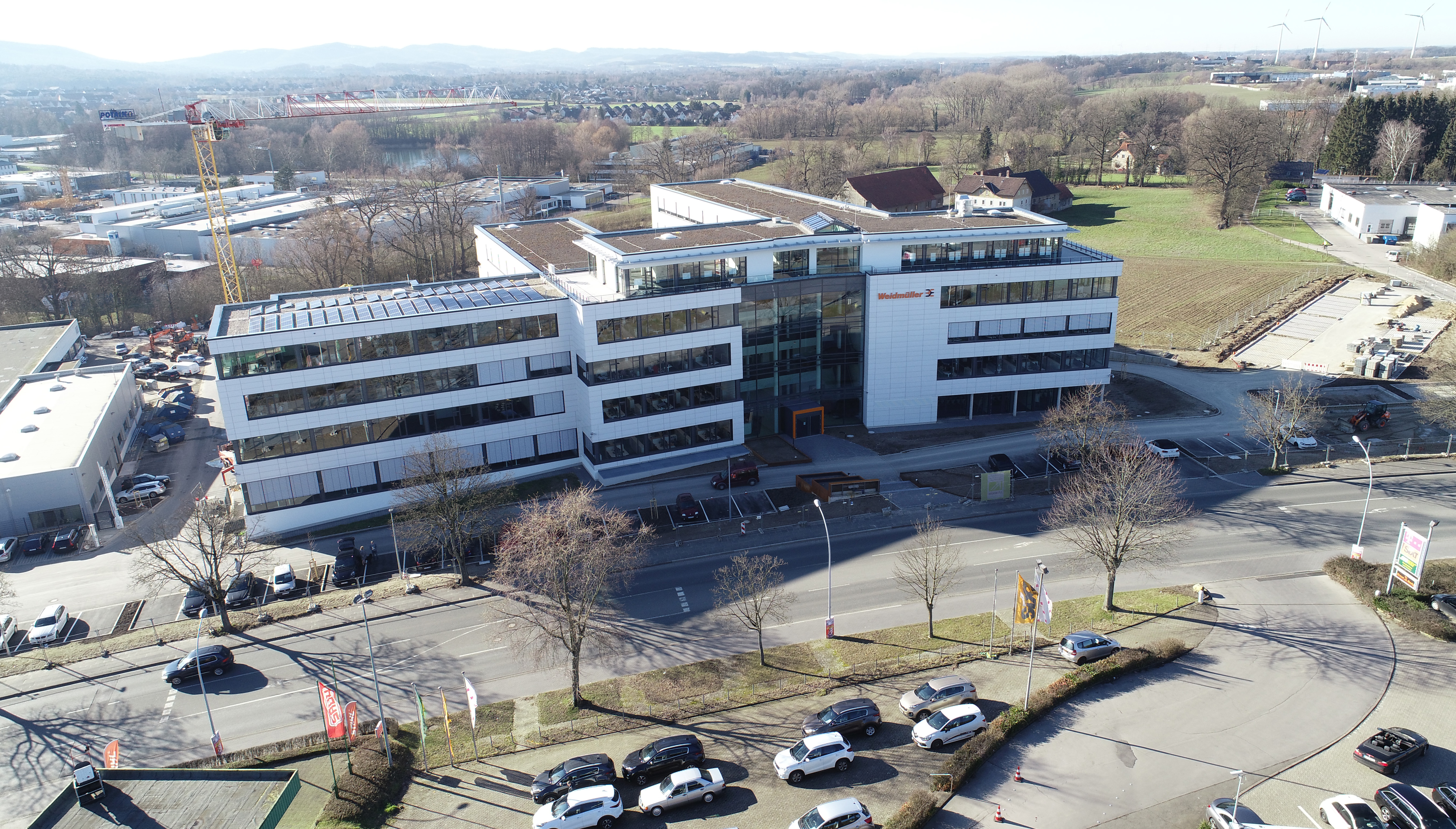 Das Kunden- und Technologiecenter am Standort Detmold